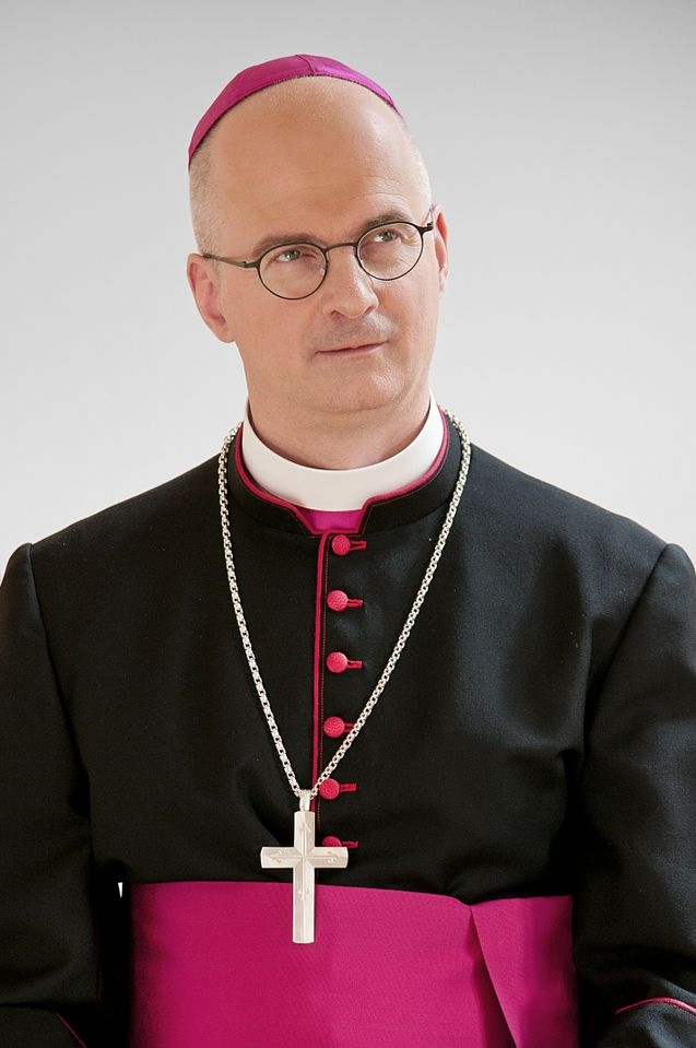 Evêque du Diocèse de Lausanne, Genève et Fribourg